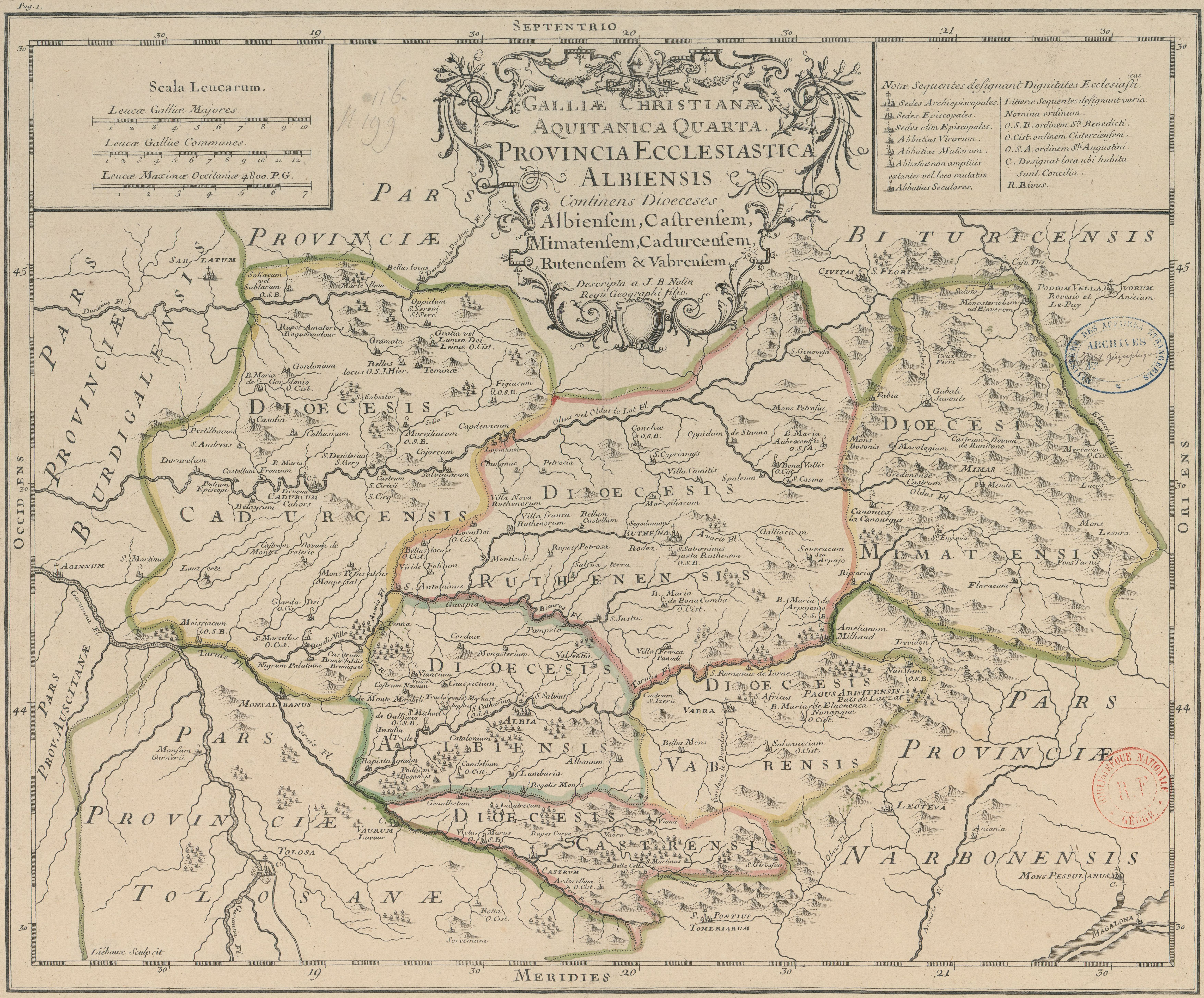 Carte de l'ancienne province ecclésiastique d'Albi, insérée dans le Tome 1 de la Gallia Christiana (1715).